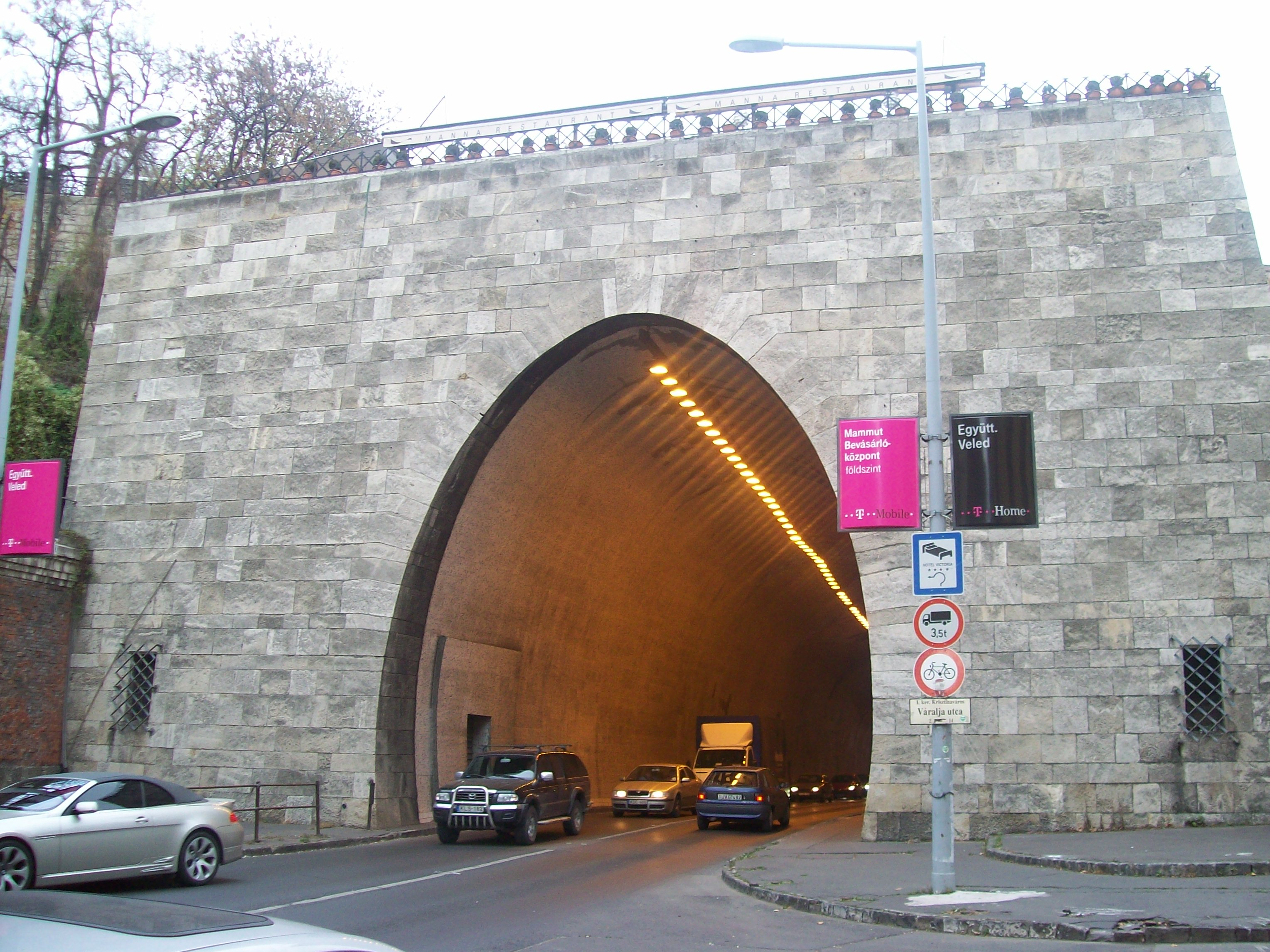 A budai Váralagút nyugati kapuja (Budapest)